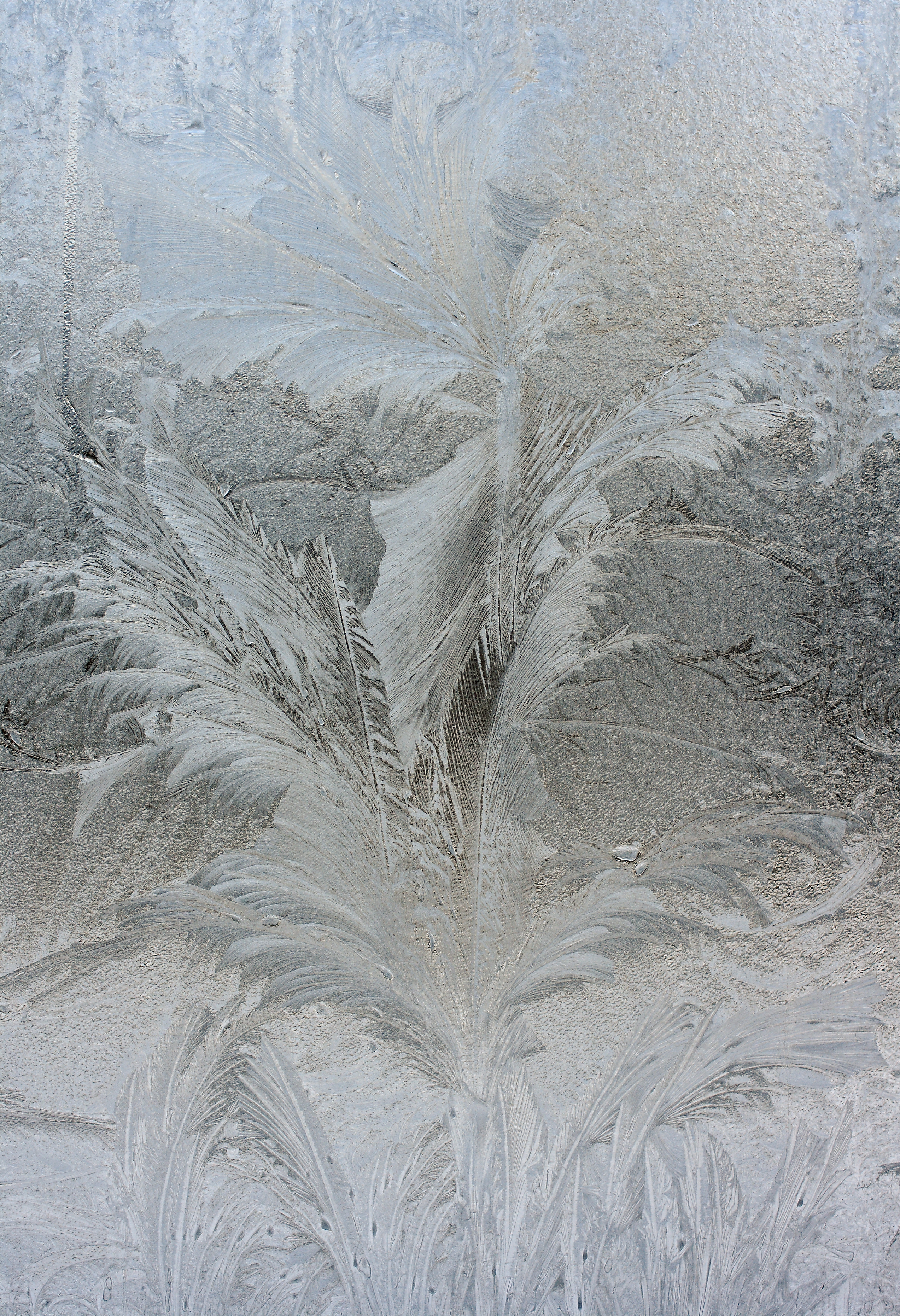 Eisblume auf einer Milchglasscheibe (Zweischeiben-Isolierglas, Innenseite). Ungeheizter Raum mit hoher Luftfeuchtigkeit, Außentemperatur etwa -13 °C. Die Originalmaße betragen etwa 48 × 70 cm